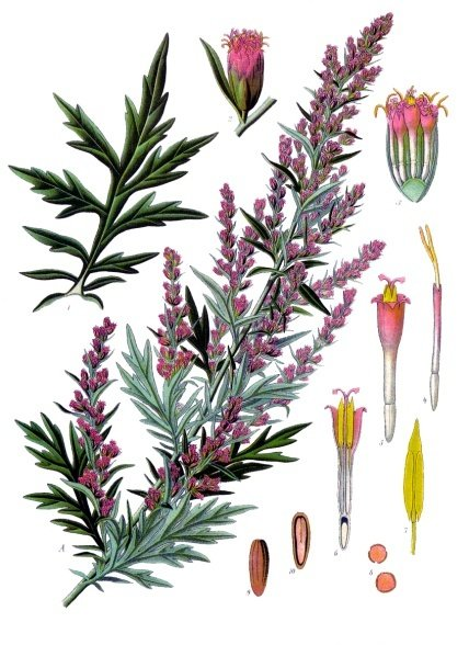 Beifuss. A Blühender Zweig. 1 Stengelblatt. 2 Blütenkörbchen. 3 Längsschnitt desselben. 4 Randblüte. 5 Scheibenblüte. 6 Dieselbe im Längsschnitt. 7 Staubblatt. 8 Pollen. 9 Achäne. 10 dieselbe im Längsschnitt.